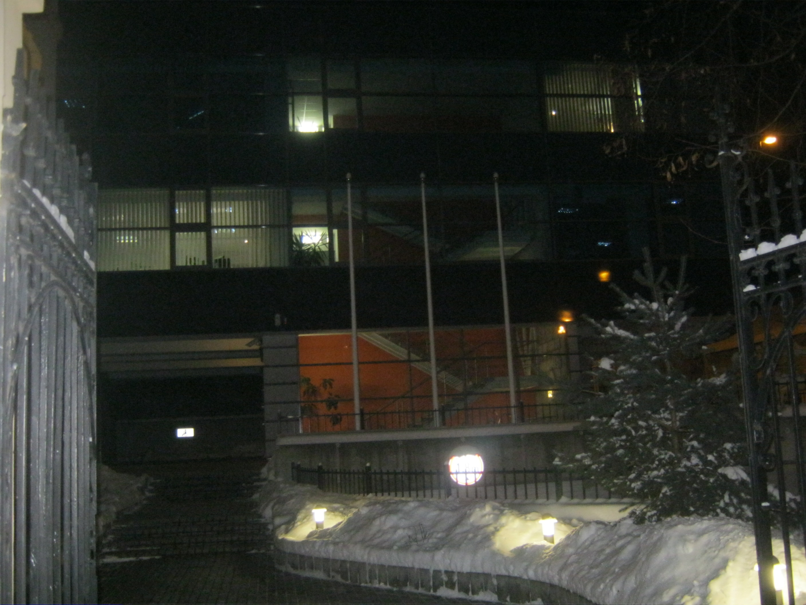 Vilnius